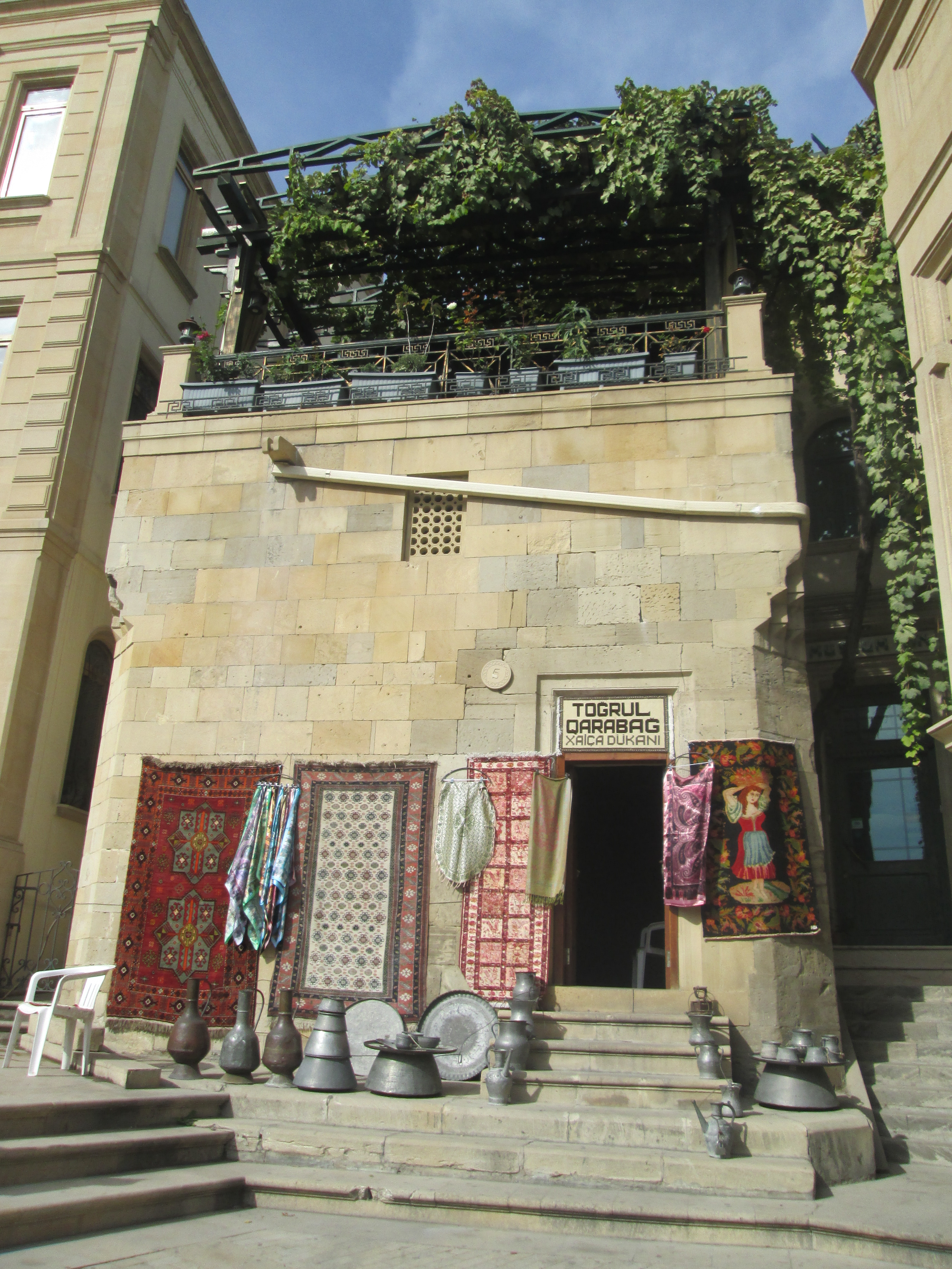 Təkiyə (1)